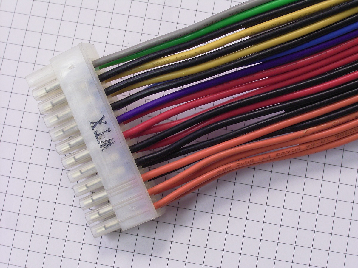 WTX-Stromanschluß